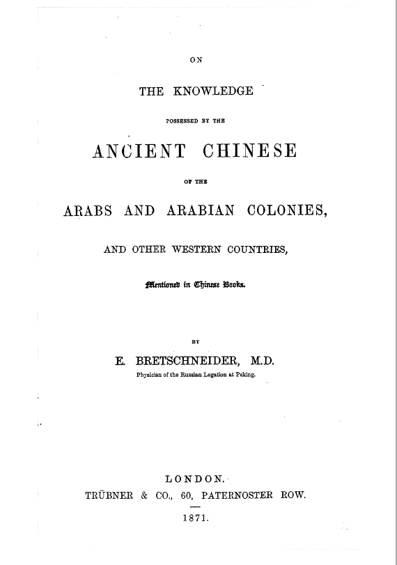 Title page of Breitschneider 1871 book